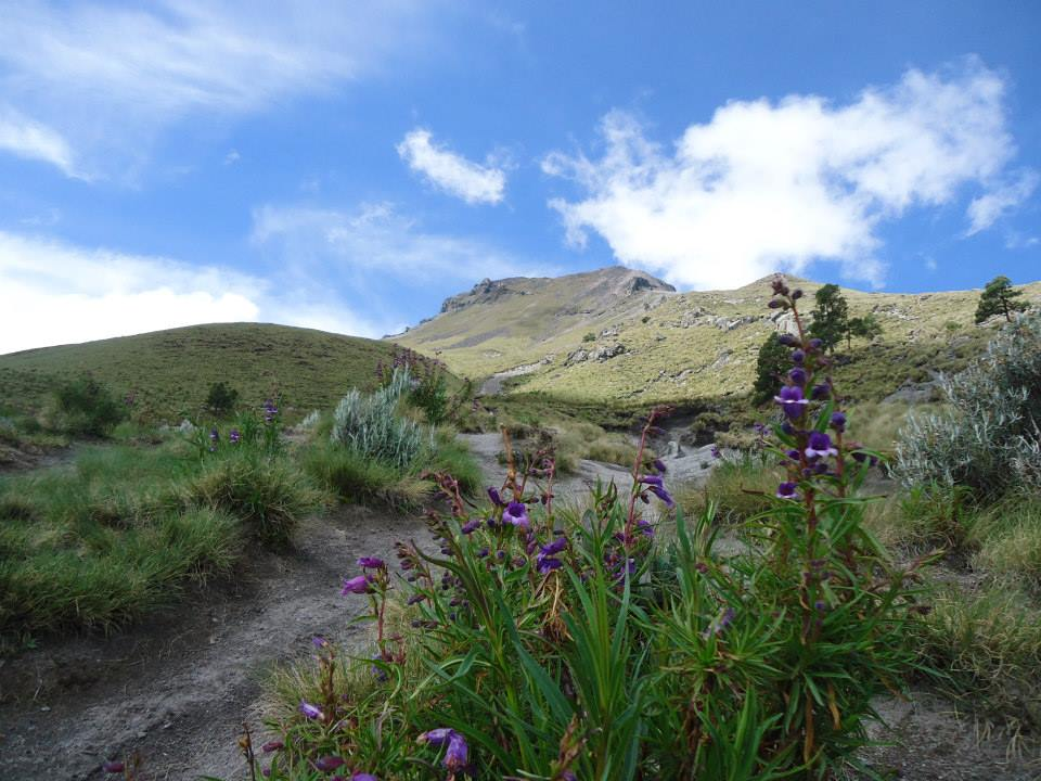 Flora característica del volcán en donde termina la zona boscosa y comienza la zona de pastizales de transición.